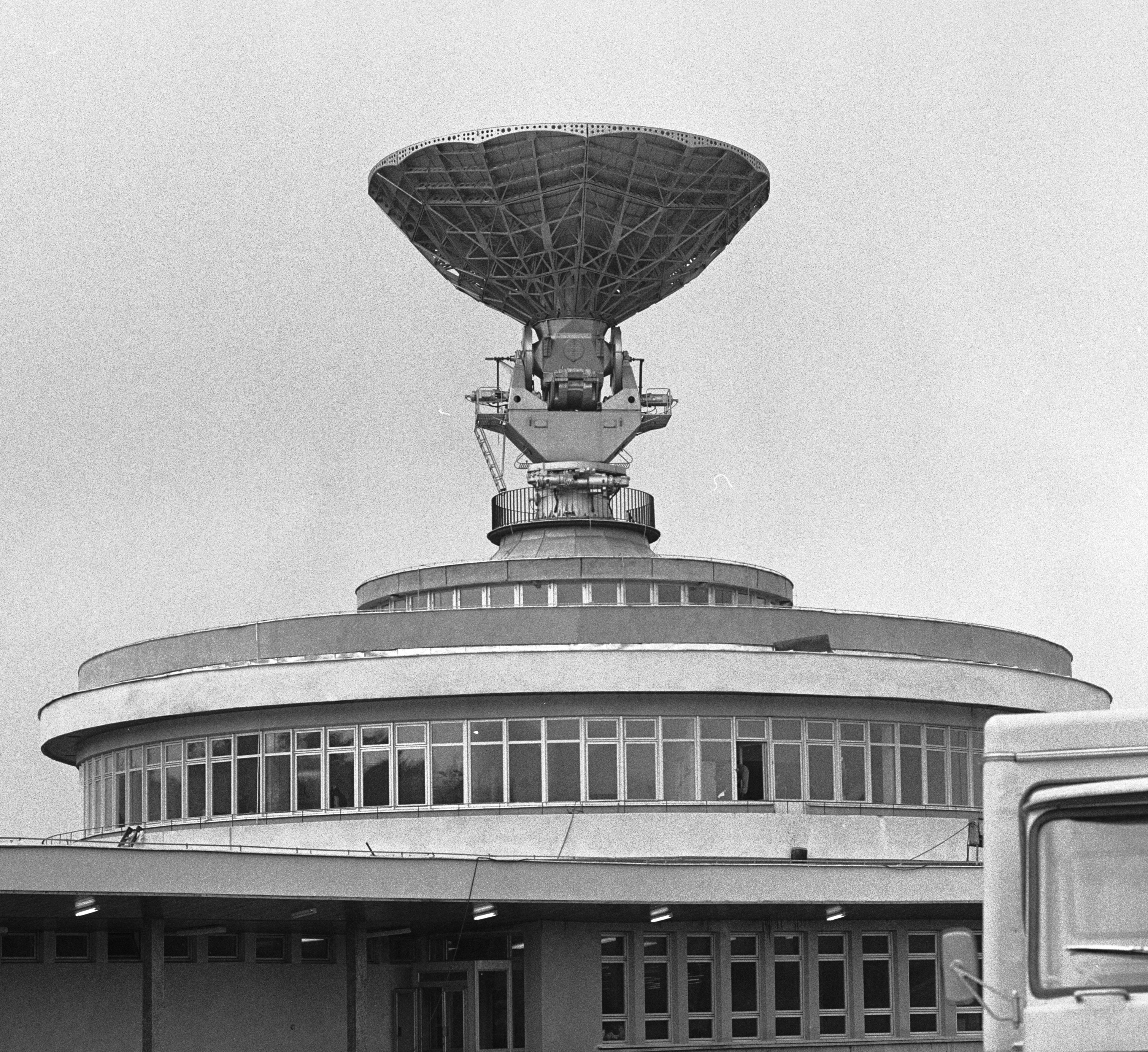 1 listopada 1975 r. w Psarach-Kątach (Góry Świętokrzyskie)